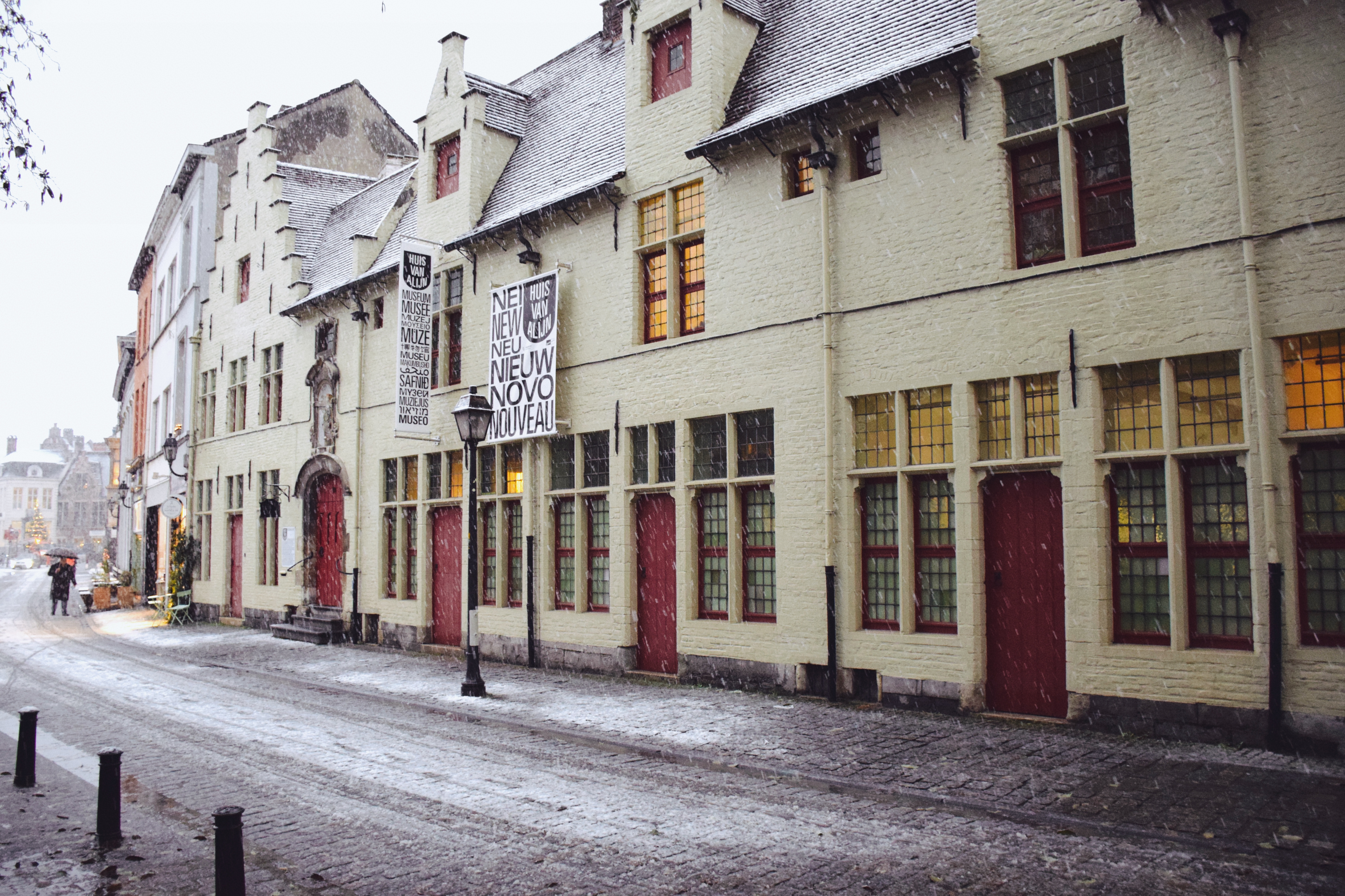 Gent (België). Huis van Alijn in de Kraanlei.